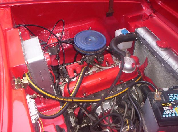 Türkiye'de seri olarak üretilen ilk otomobil markası Anadol'dan bir görünüm.